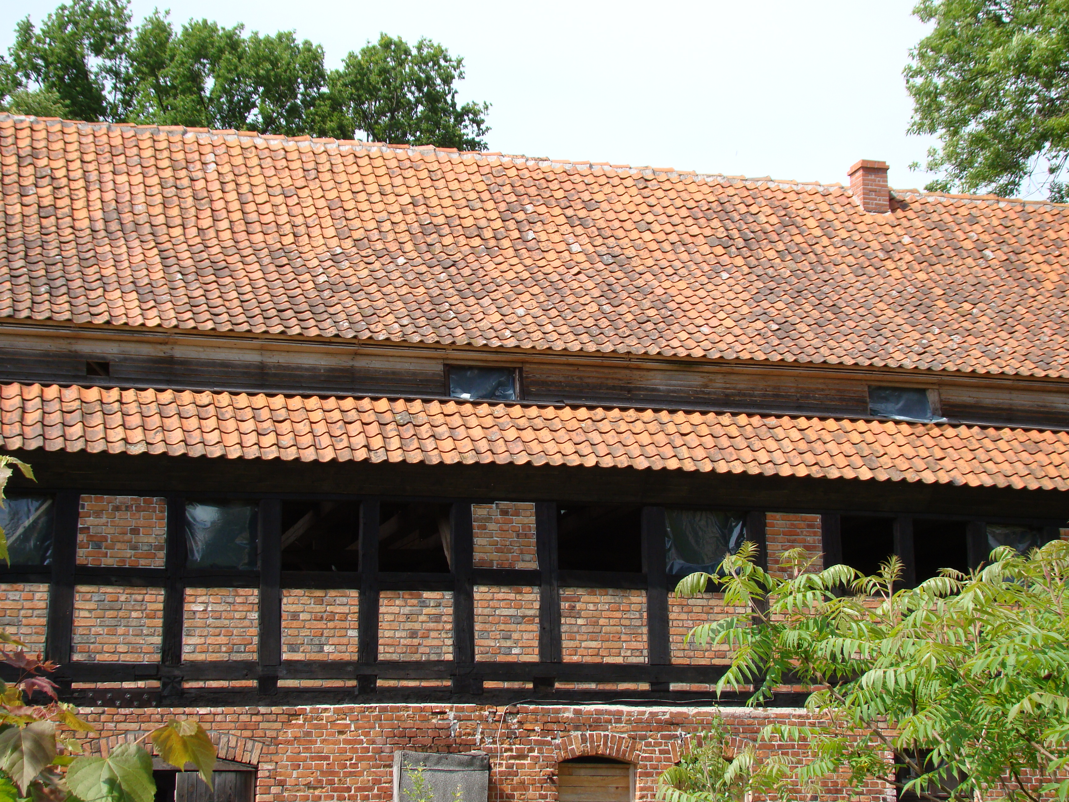 Gajlity - spichlerz 09.1968.